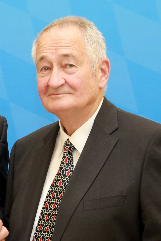 Roland Koller, deutscher Jurist und Politiker (CSU), Polizeipräsident in München (von 1988 bis 2002). Hier am 19. Juni 2017 im Bayerischen Innenministerium, nachdem er für langjährige und nachhaltige Verdienste um die innere Sicherheit in Bayern mit dem "Stern der Sicherheit" (Bayerische Staatsmedaille Innere Sicherheit) ausgezeichnet wurde. Titel des Werks: "Roland Koller am 19. Juni 2017 im Bayerischen Innenministerium".